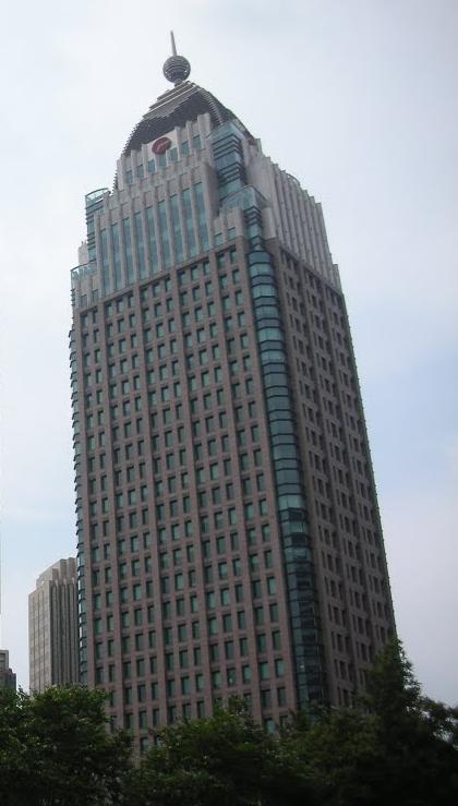 遠雄金融中心，位於臺北市信義區松高路1號。